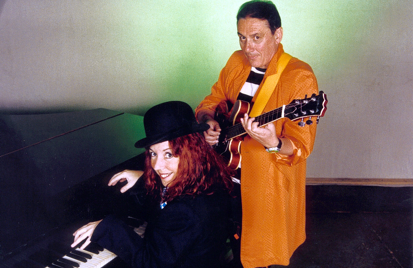 año 2002